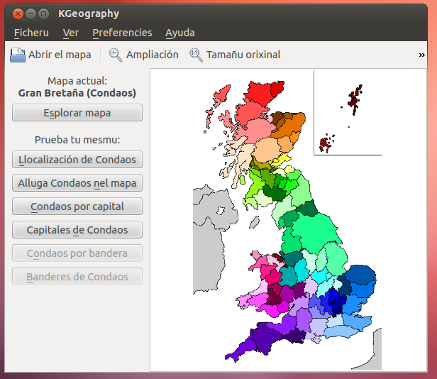 captura pantalla de kgeography en llingua asturiana